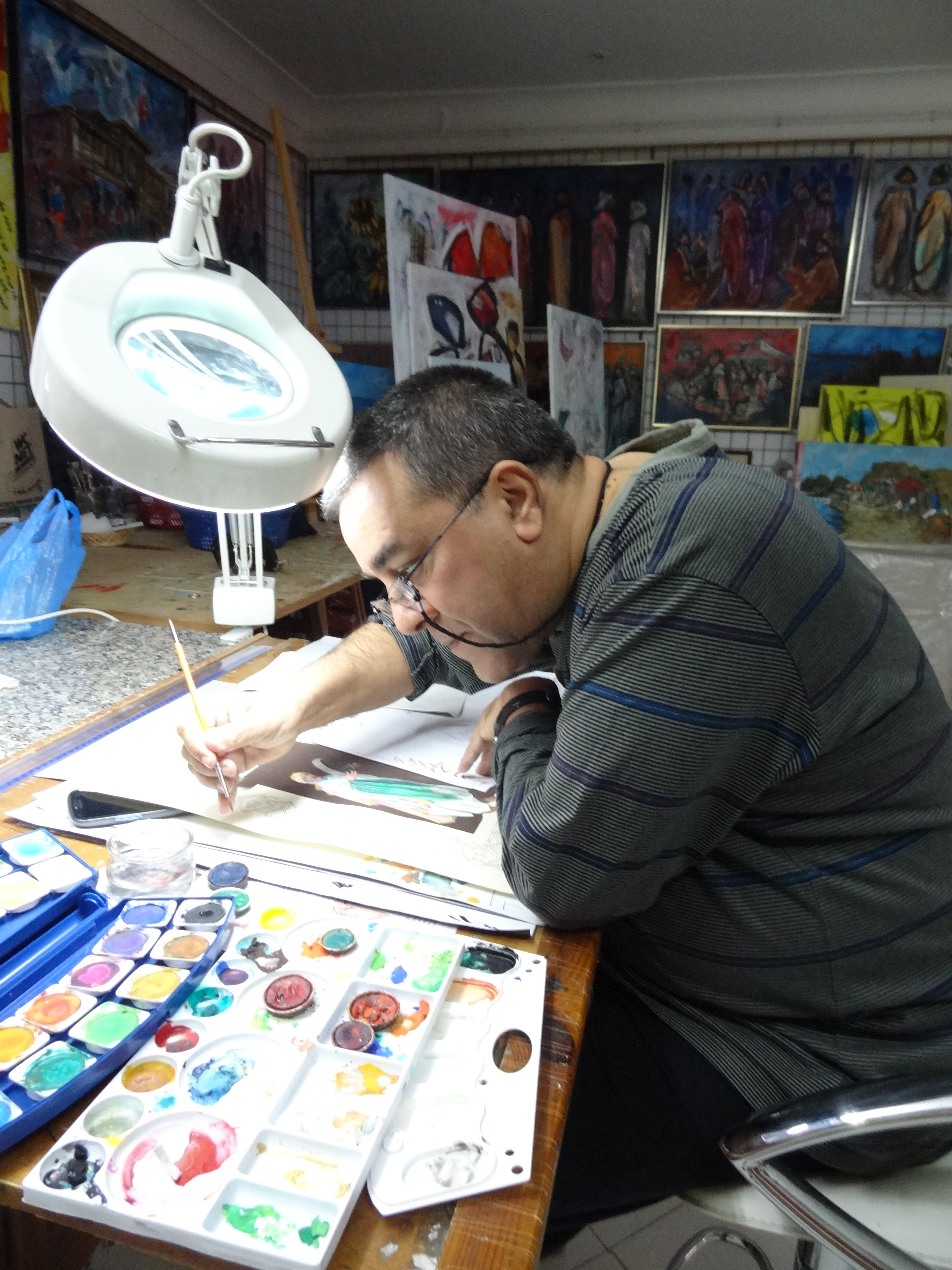 Hachemi Ameur entrain de travailler dans son atelier